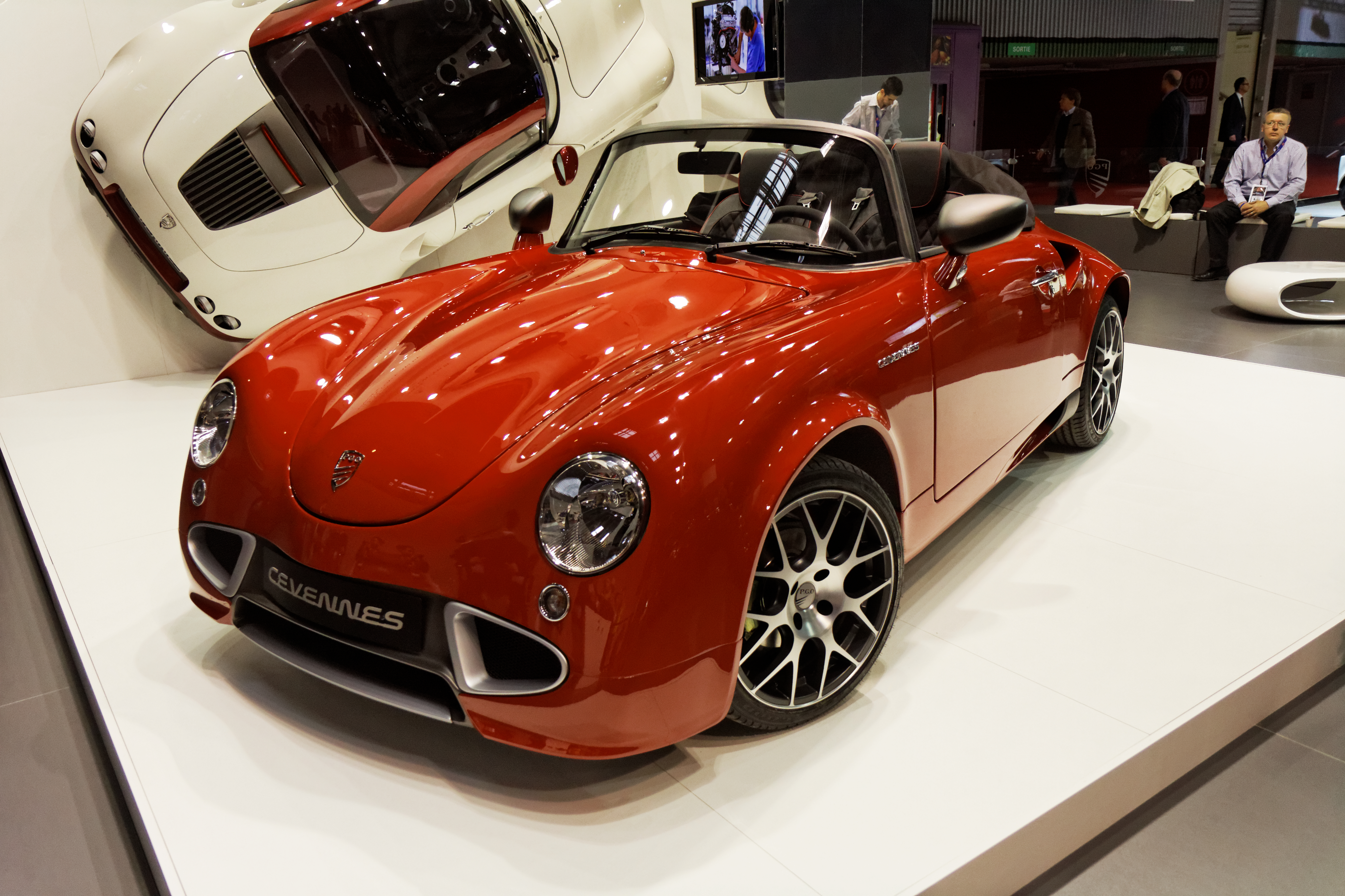 Une PGO Cevennes présentée lors du Mondial de l'Automobile de Paris 2012.